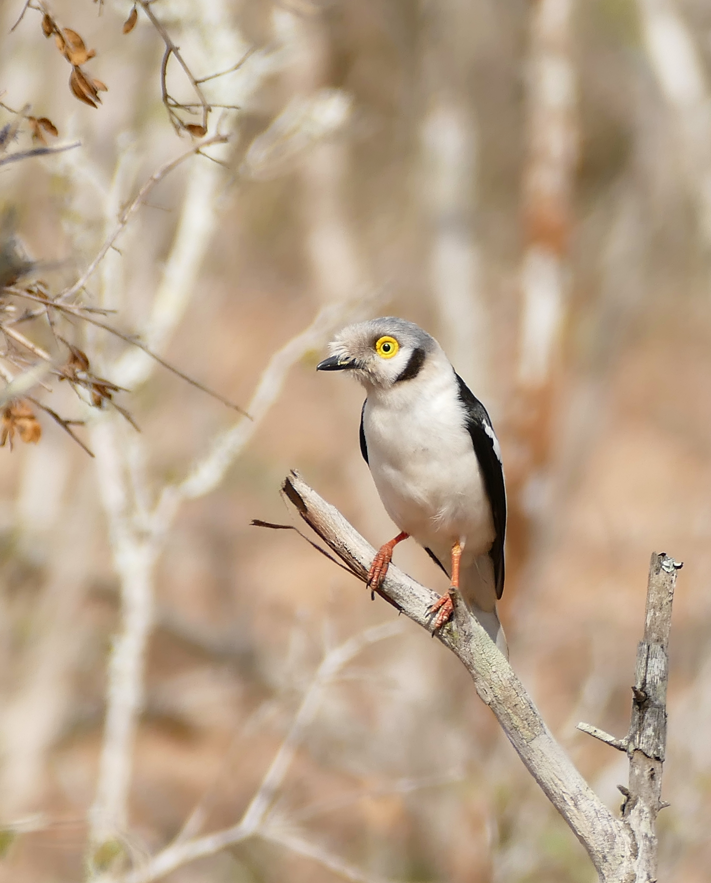 uMkhuze Game Reserve, Kwazulu-Natal, SOUTH AFRICA